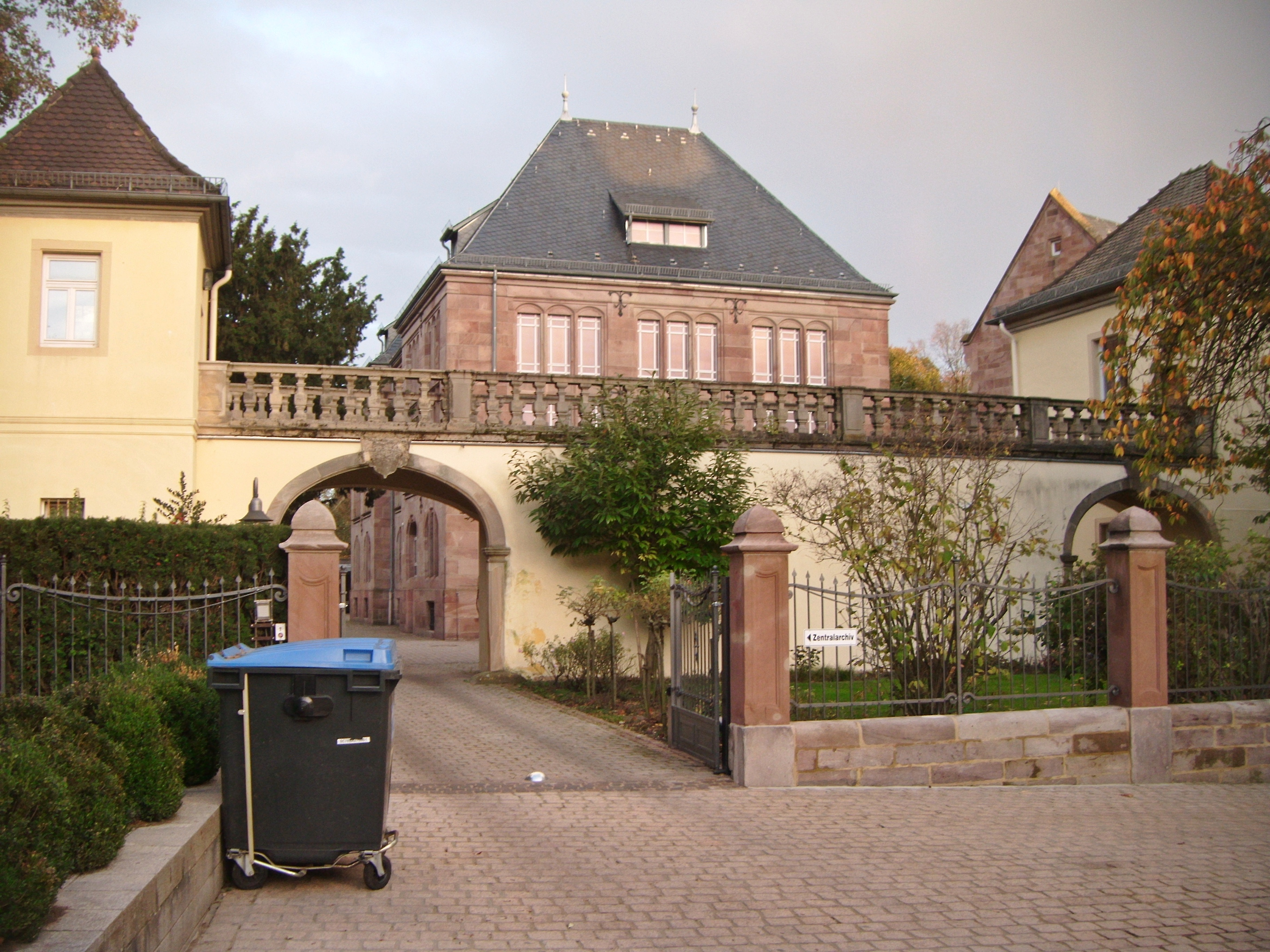 Die Auwach-Balustrade in Speyer, 1702